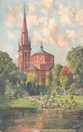 Kościół św. Piotra i Pawła w Bydgoszczy - stara pocztówka